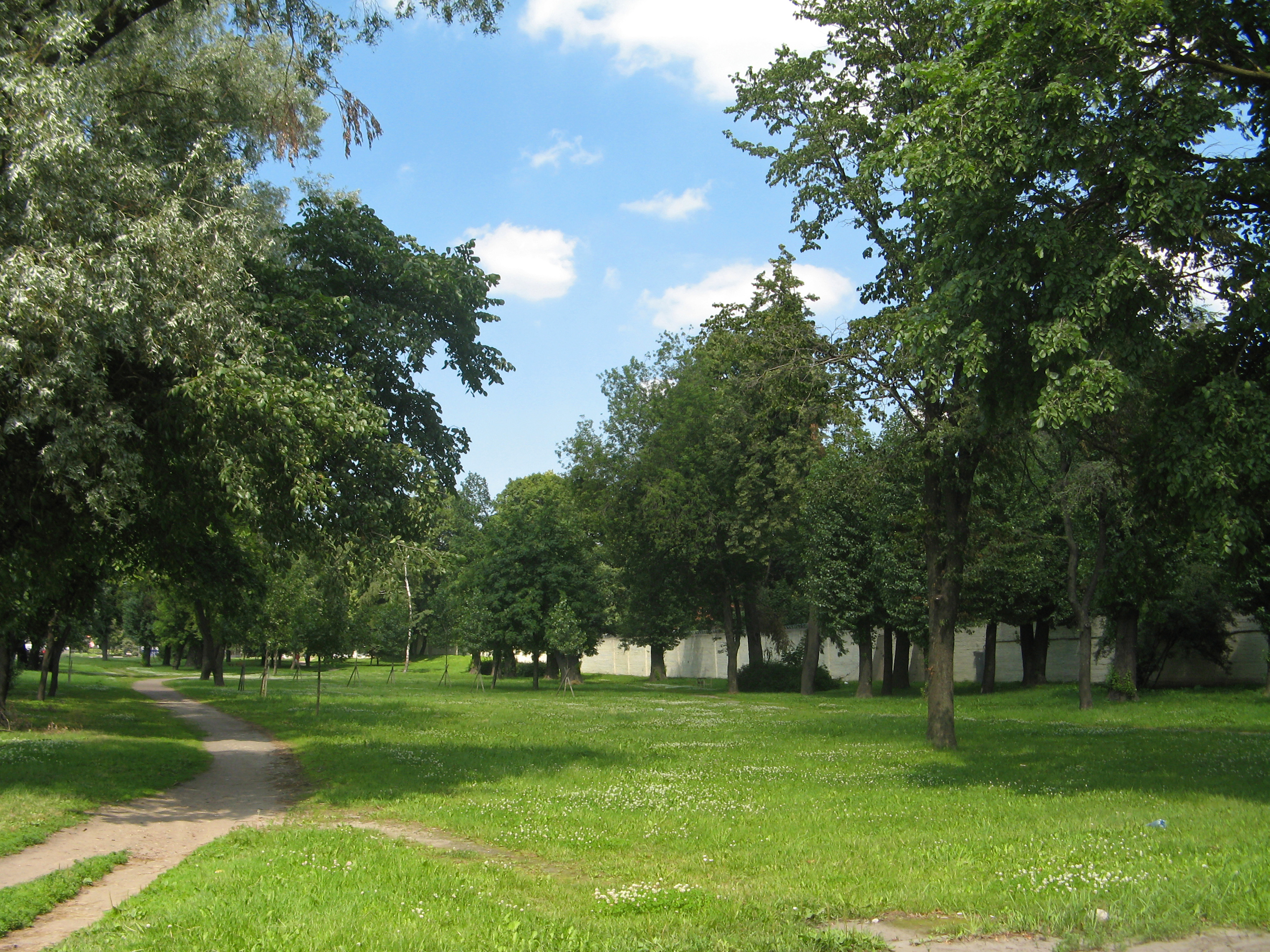 Сквер Текстильщиков, Санкт-Петербург